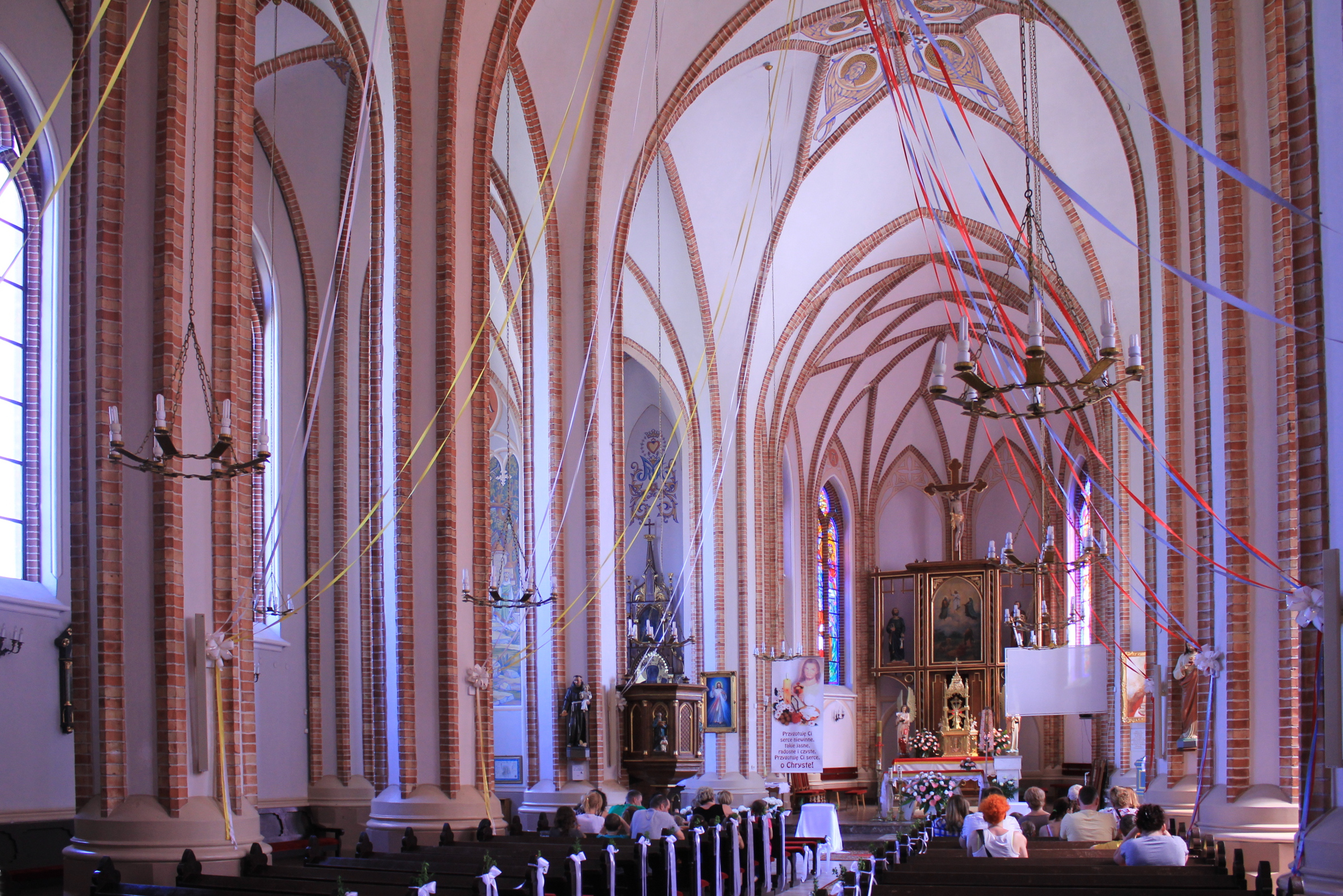 Zuzela - rzymskokatolicki kościół parafialny p.w. Przemienienia Pańskiego, 1908, 1957